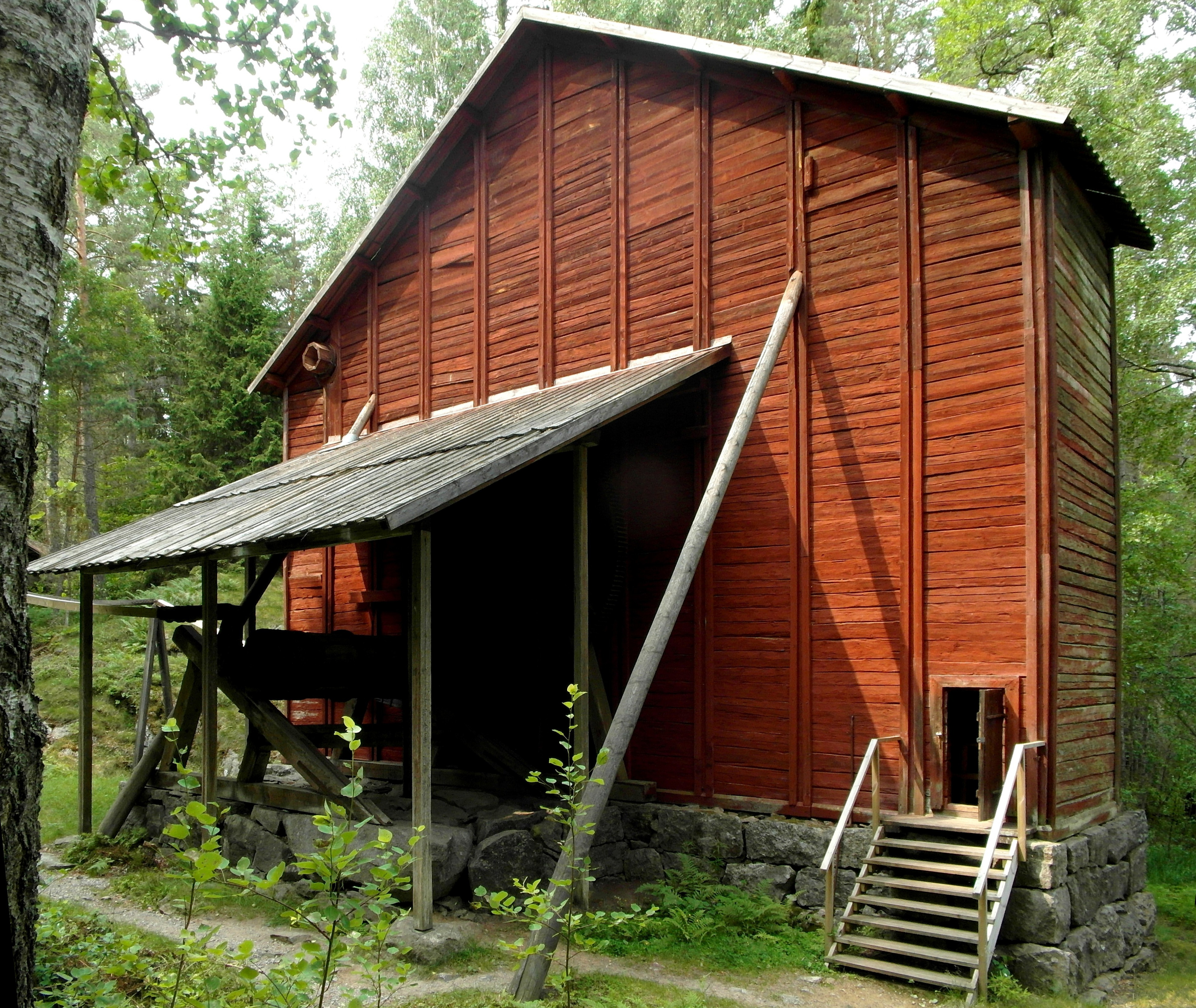 Vattenhjulet Bredsjönäskonsten, Åker, Södermanland, juli 2013